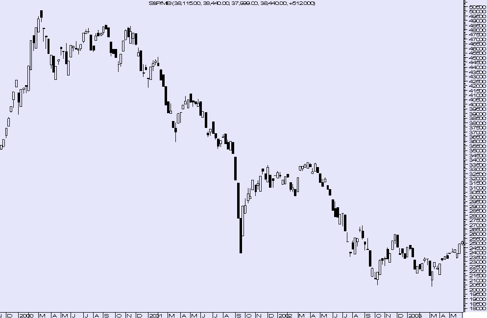 Autore: FeRR@; grafico ottenuto da Metastock, un software di analisi tecnica molto usato da professionisti del settore. Il grafico è settimanale (weekly) dell'indice SPMIB italiano.